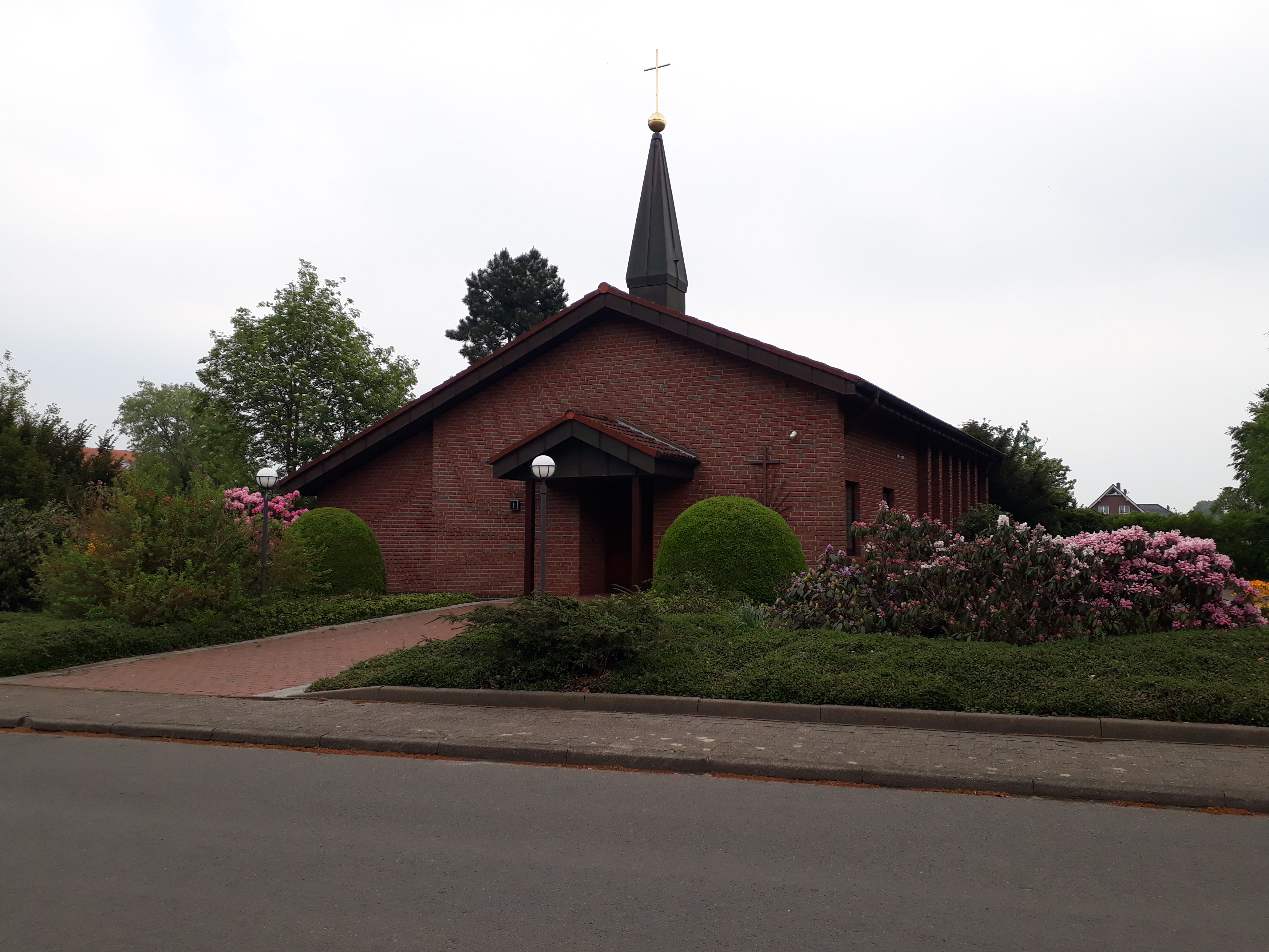 Neuapostolische Kirche in Wangersen, Gemeinde Ahlerstedt, Landkreis Stade, Niedersachsen, Deutschland.